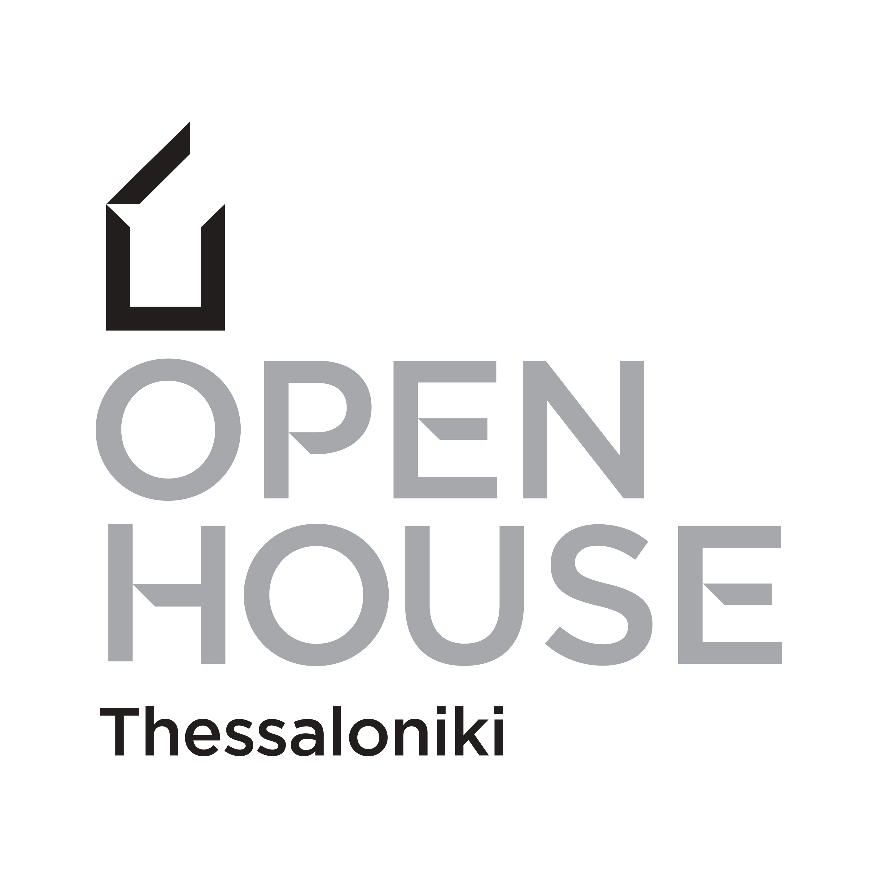 Open House Thessaloniki logo designed by Beetroot